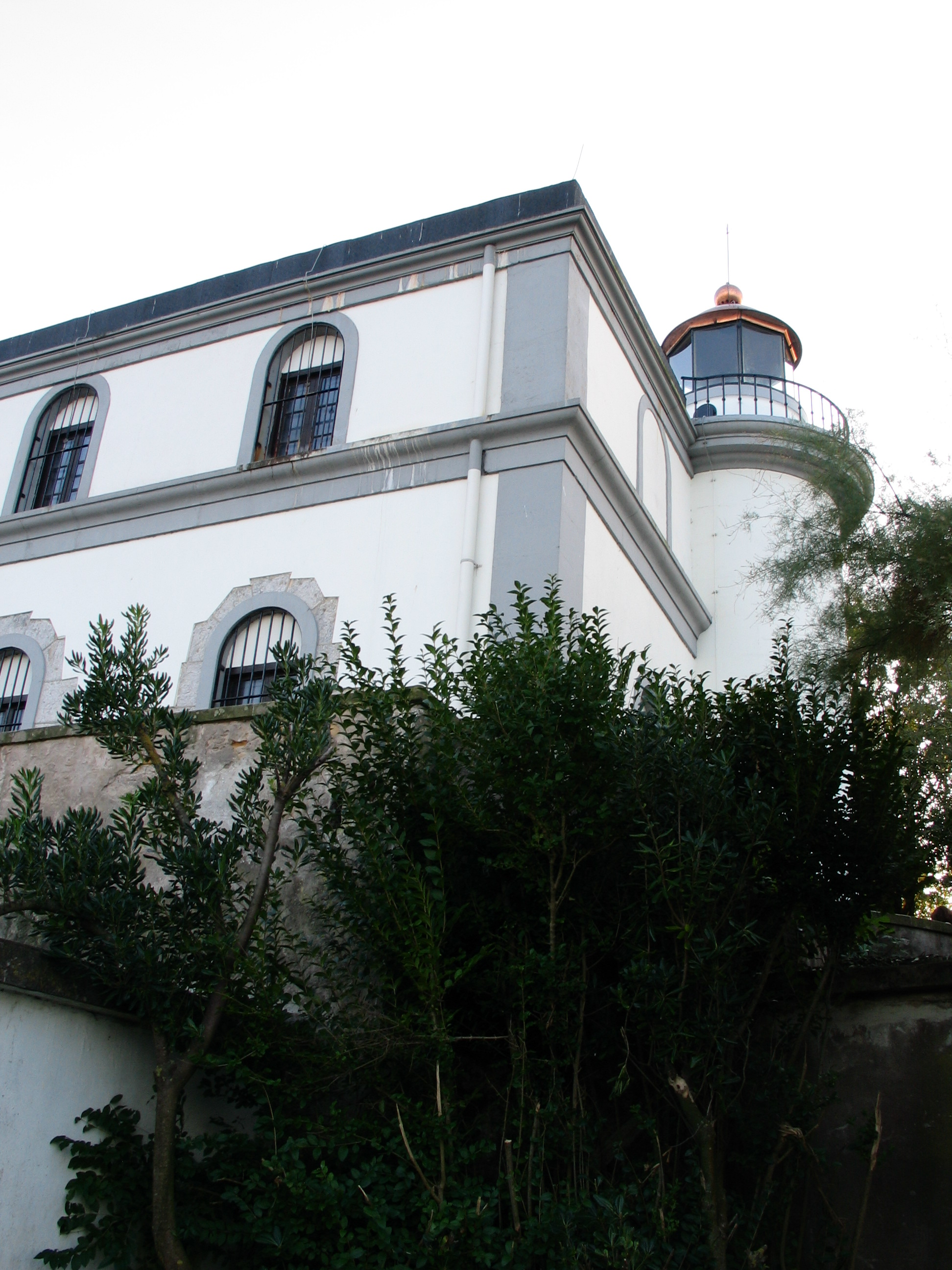 Santa Klara uharteko itsasfaroa. Donostia